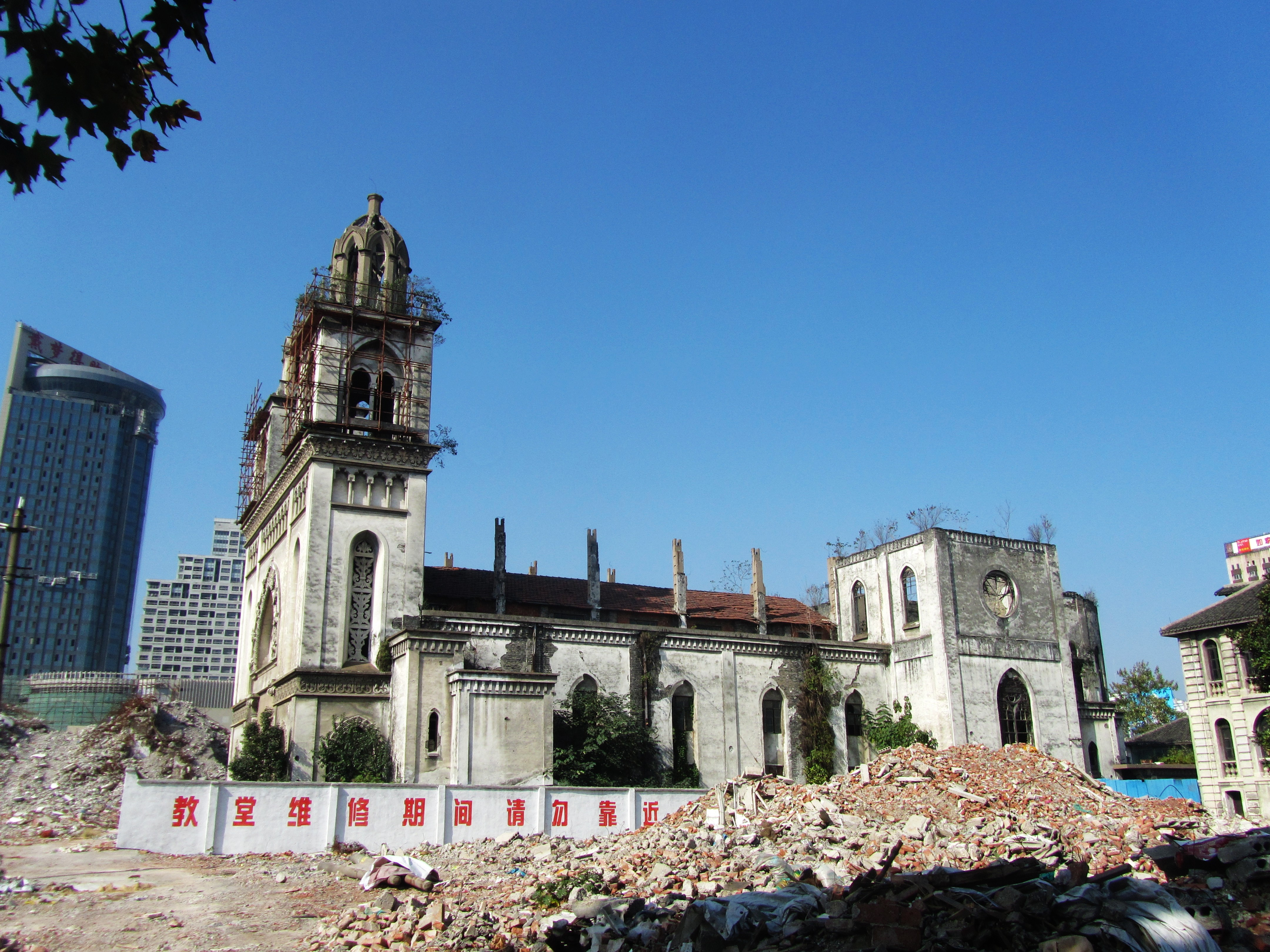 嘉兴圣母显灵堂，东面。